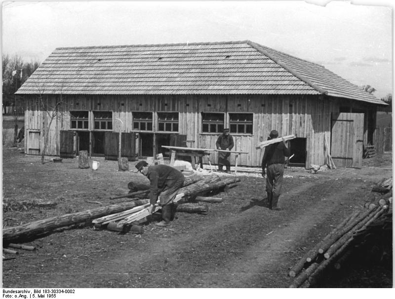 Schenkendorf, Bau eines Ferkelstalls Zentralbild 5.5.1955 Bauer Neubert aus Schenkenforf führte das "Grüne Fließband" ein. Der werktätige Einzelbauer Neubert aus Schenkendrof, Kreis Trokow, will erreichen, pro Kuh im Jahr 4000 kg Milch zu erhalten und von jeder Sau im Jahr 20 Ferkel aufzuziehen. Da er seit Jahren schon in seiner Wirtschaft das "grüne Fließband" eingeführt hat, ist Bauer Neubert in der Lage, seinem Vieh durch Fütterung von Grünfutter best. Silage und Kartoffeln ständig das günstige Verhältnis von Eiweiß- und Stärkefutter auszuführen. So erreicht er seine guten Erfolge im Viehstall. UBz: Bauer Neubert konnte den freien Aufkauf mehrerer Schweine zur Verfügung stellen. Auf Grund der guten Einnahmen kann er seine Wirtschaft ausbauen. Sein Ferkelaufzuchtstall für naturhafte Haltung ist fast fertiggestellt.